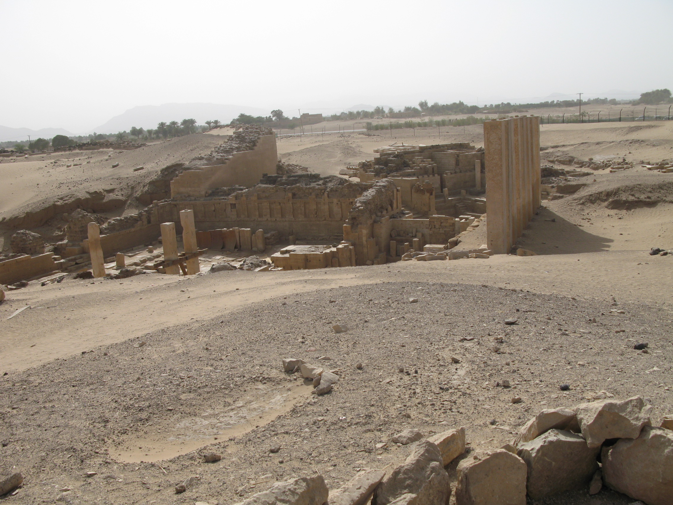 Tempelj Sonca v Maribu